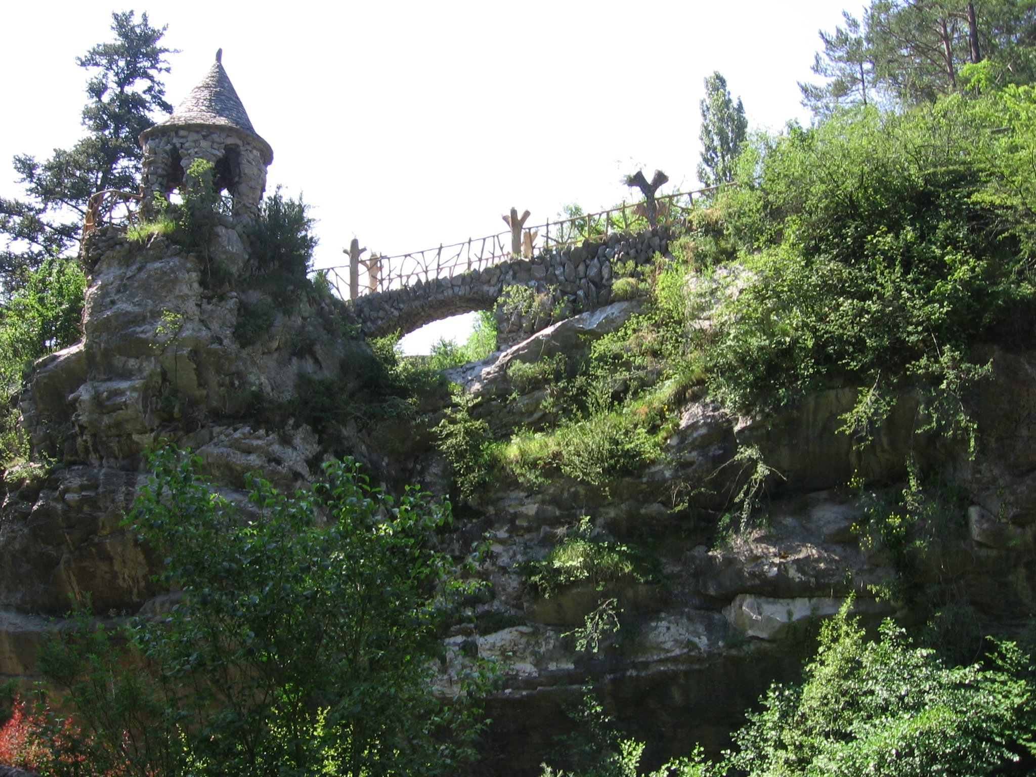 Jardines de Can Artigas, La Pobla de Lillet (Barcelona)